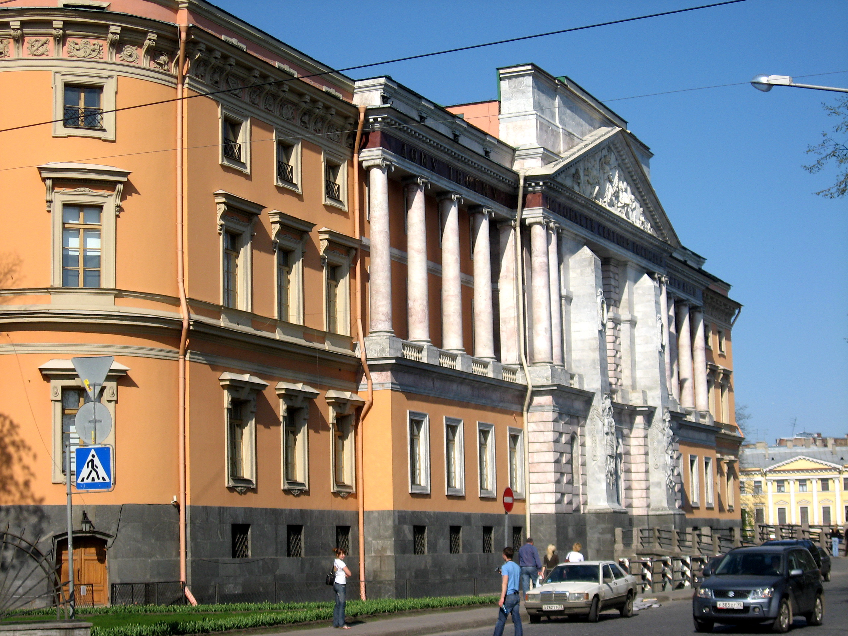 Michailovský zámek